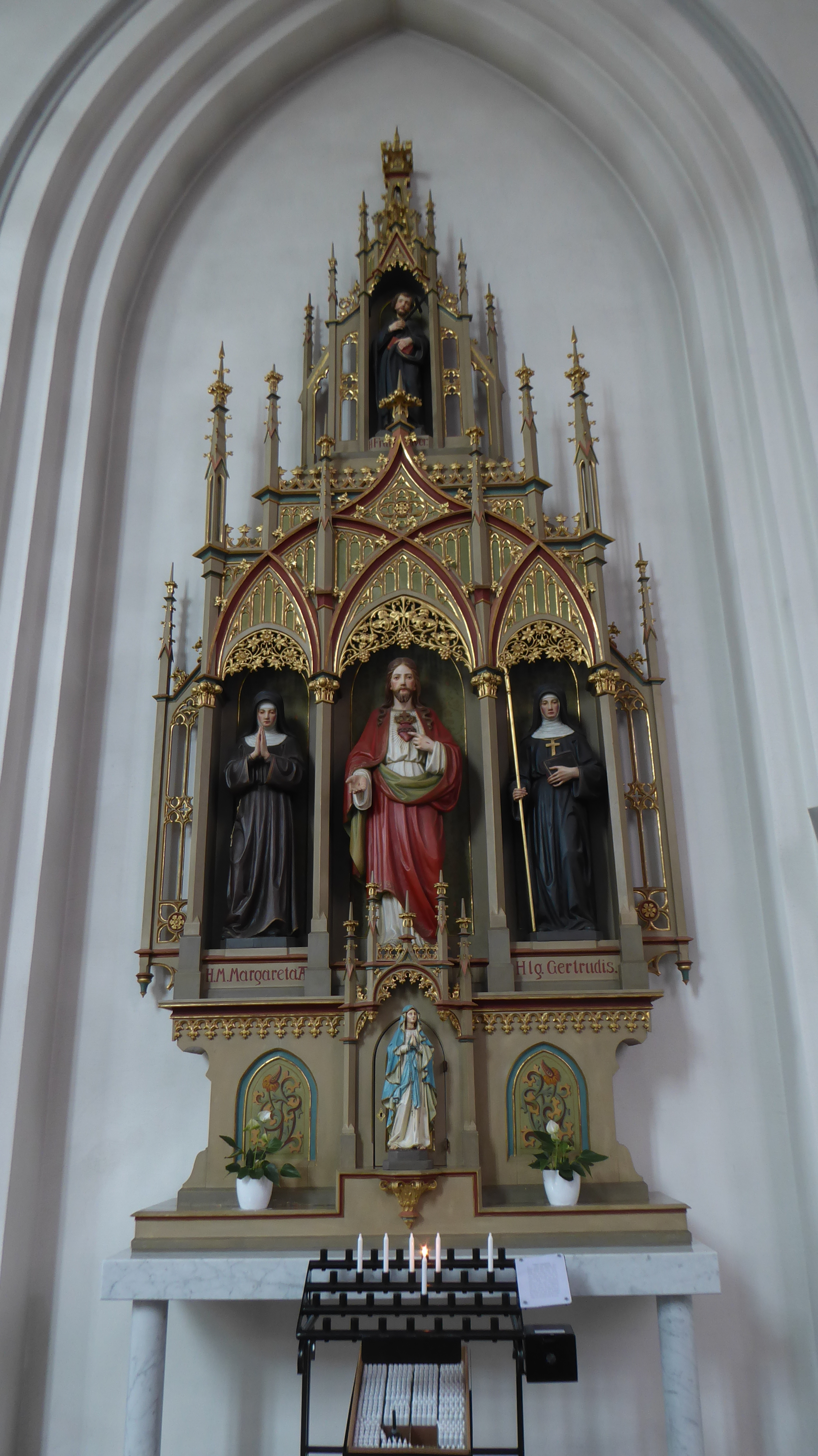 Pfarrkirche Ruggell FL: Herz-Jesu-Altar aus dem Jahr 1925 von Anton Rebholz aus Altenstadt